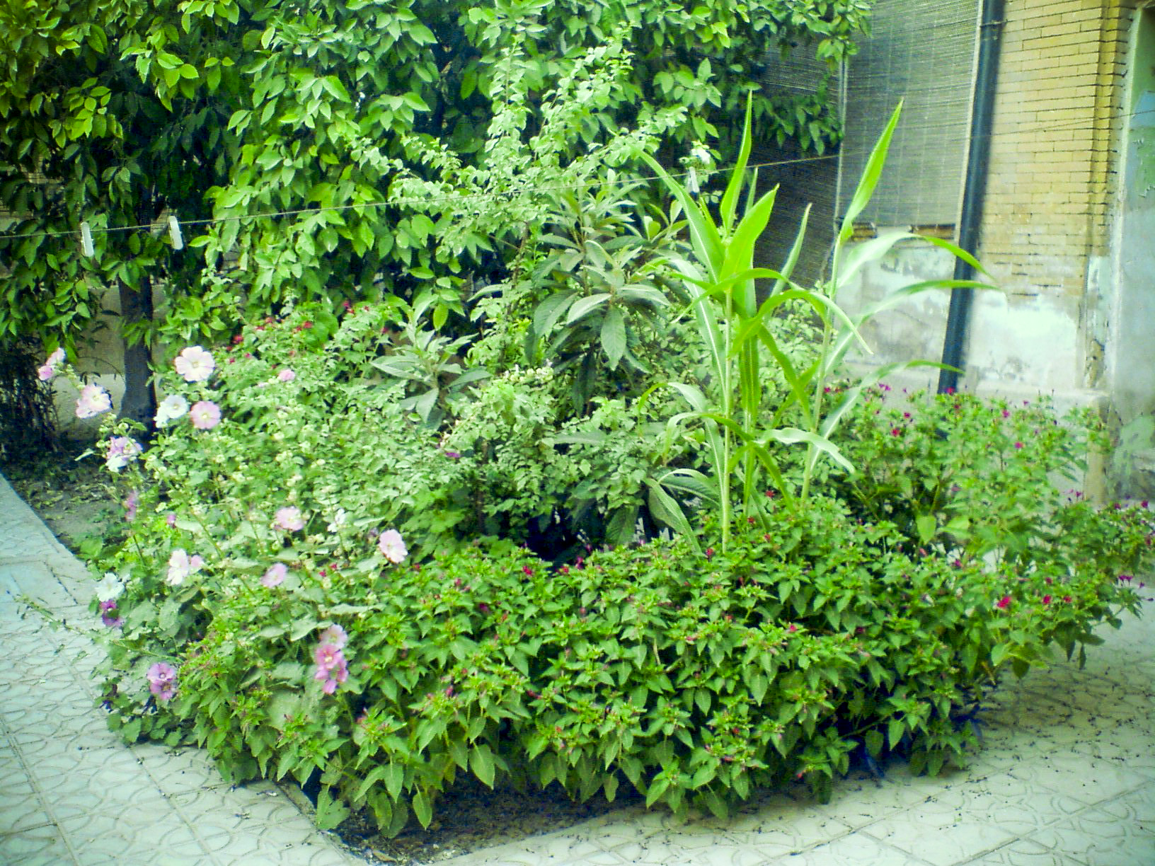 باغچه های بزرگ و سرسبز